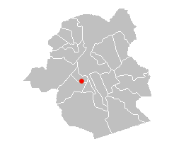 Locatie van de halte (zie bestandsnaam).